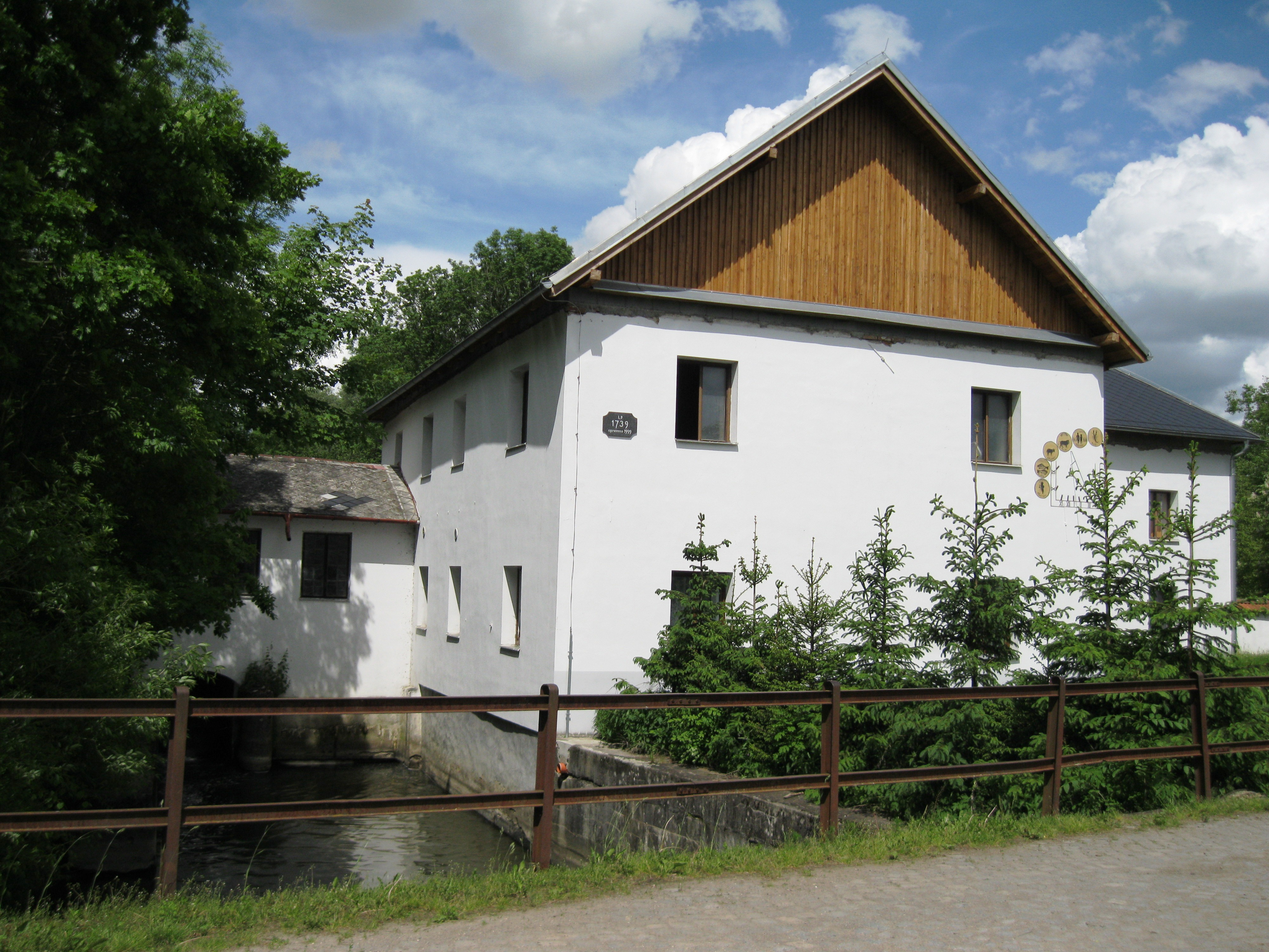 Vodní mlýn (Citov), Citov 38